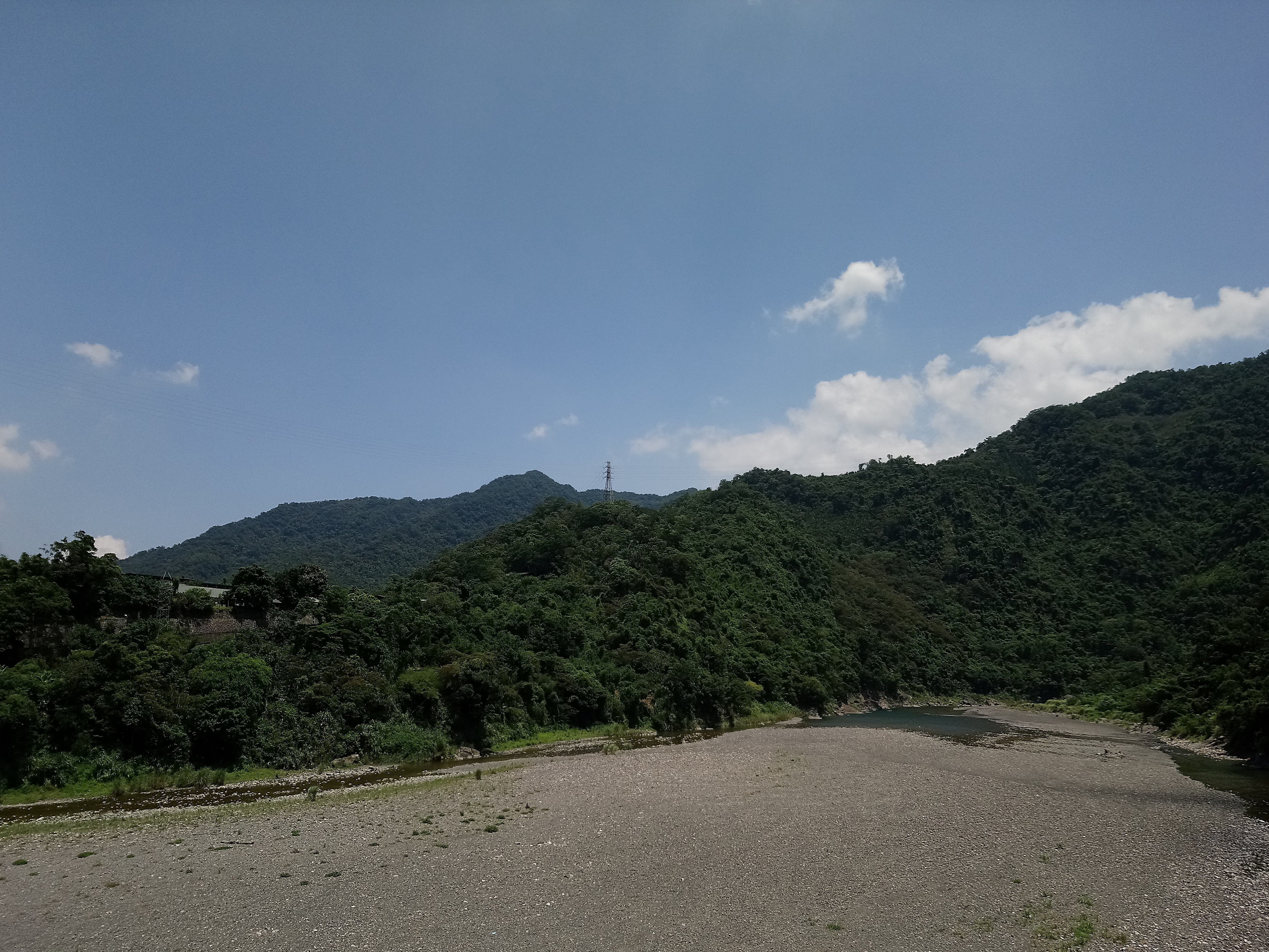 流經直潭的南勢溪,新北市新店區龜山里